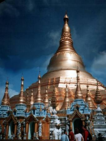 Schwedagon Pagoda in Rangoon, Myanmar